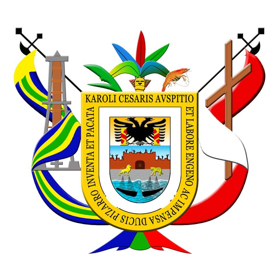 Escudo de la Ciudad de Tumbes, capital del Departamento de Tumbes